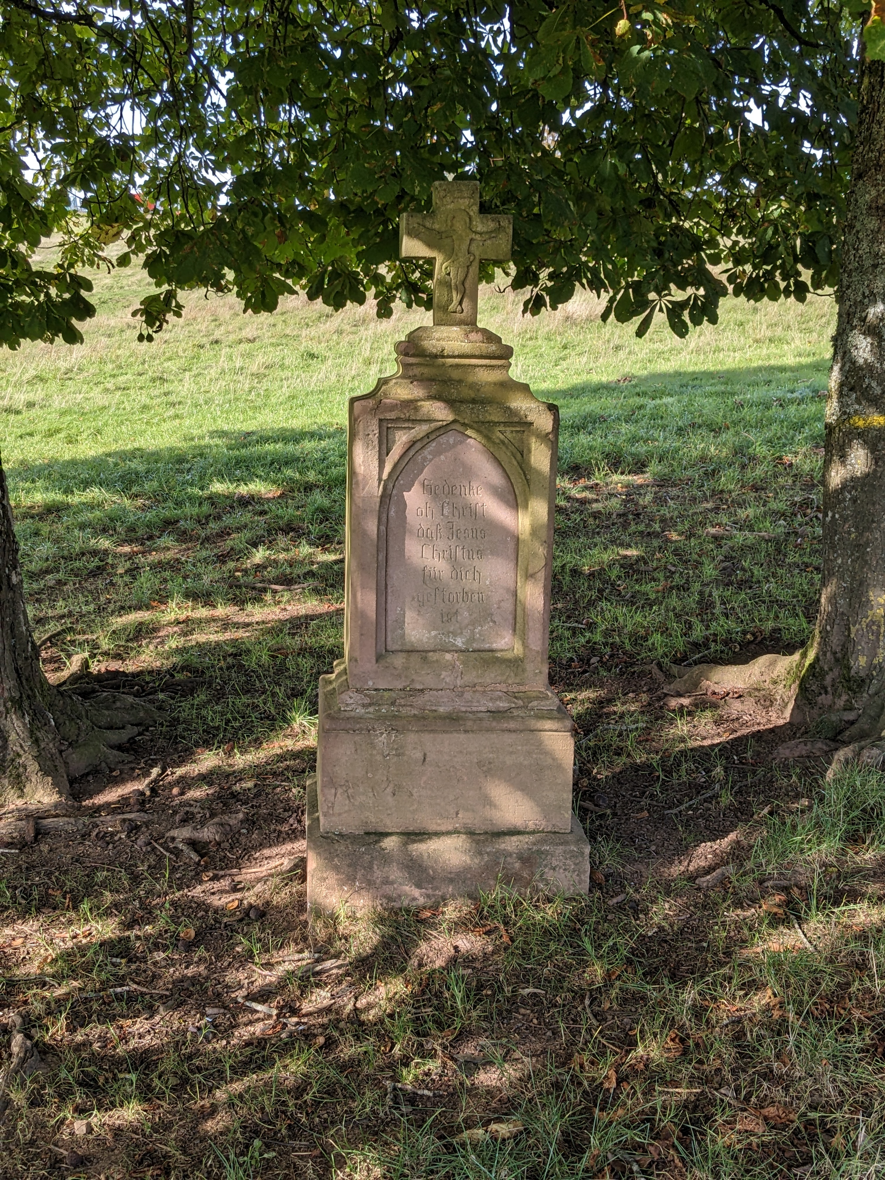 Landwehrkreuz in Mehring nahe der Grenze zu Longen